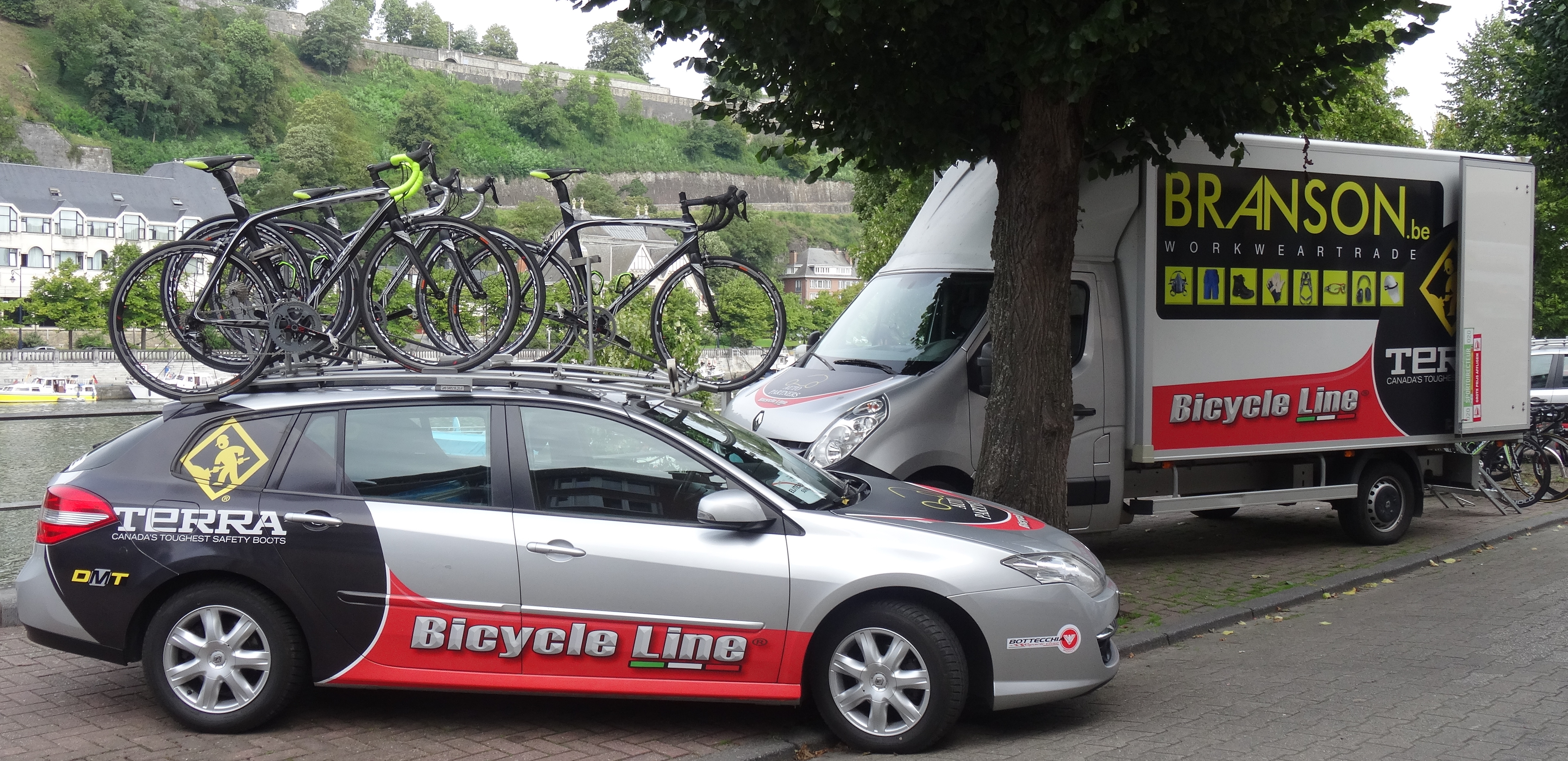 Reportage photographique réalisé le mercredi 6 août à l'occasion du départ de la première étape du Tour de la province de Namur 2014 à Jambes (Namur), Belgique.